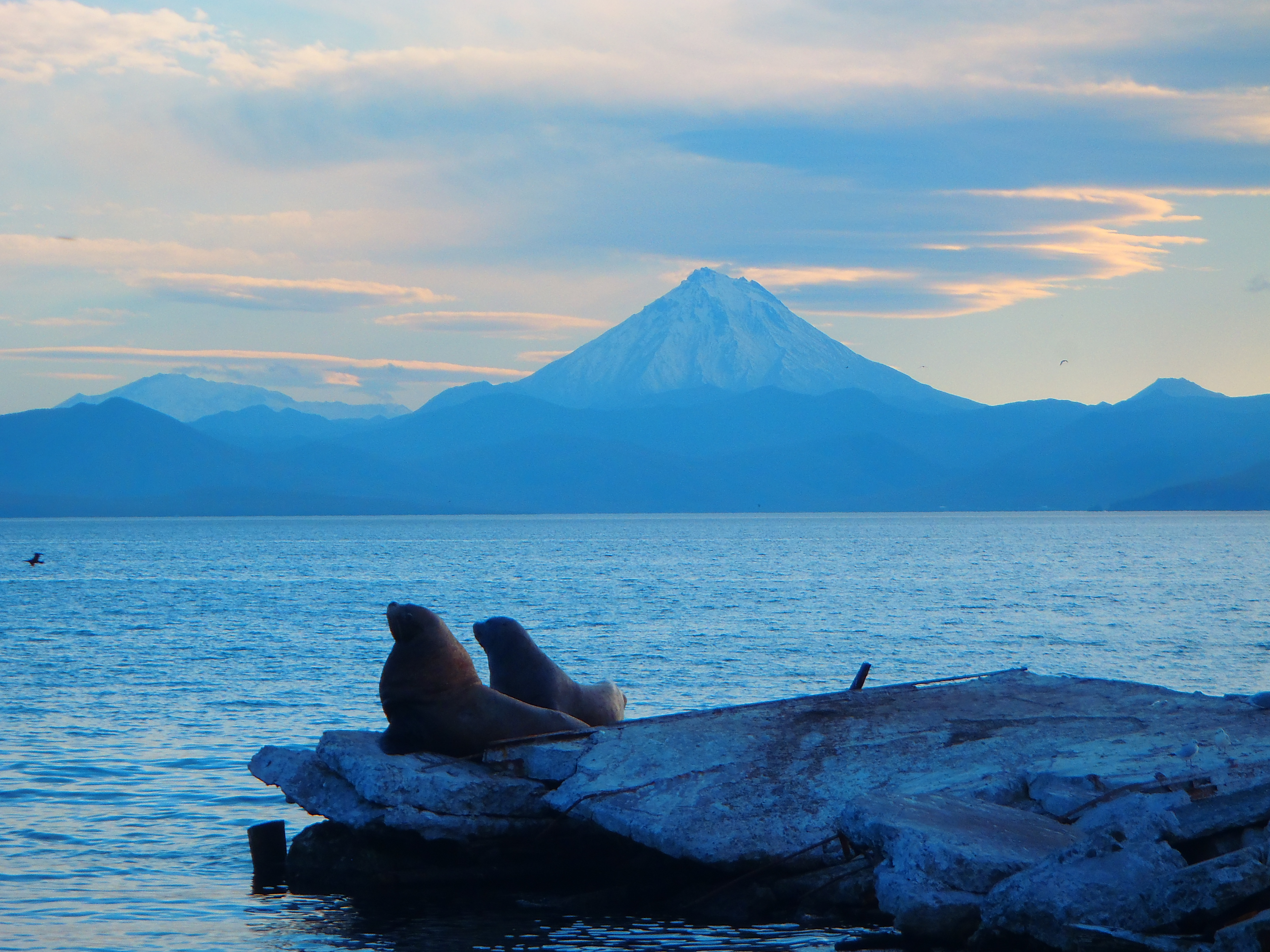 Лежбище сивучей в Петропавловске-Камчатском, Петропавловск-Камчатский This image is related to the protected area of Russia number 4110151